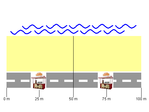 Iceseller problem 1